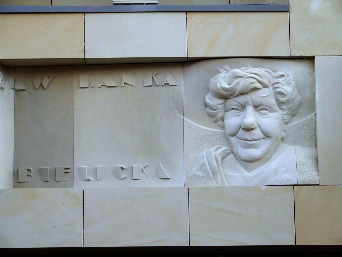 Hanka Bielicka 1915-2006, płaskorzeźba na Kinie Praha w Warszawie